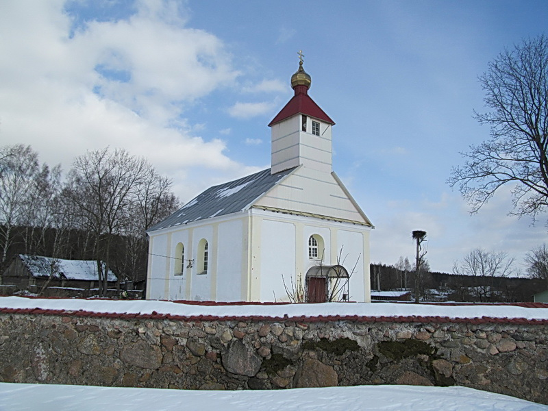 Славацічы. Царква Святога Георгія